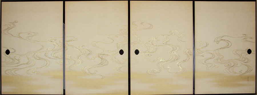 Japan; Door panels; Paintings